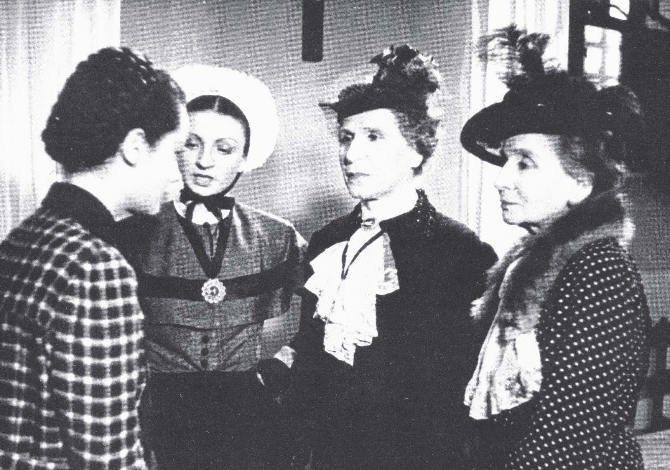 Maria Denis, Rina Morelli, Irma ed Emma Gramatica in "Sissignora" (Poggioli, 1941)